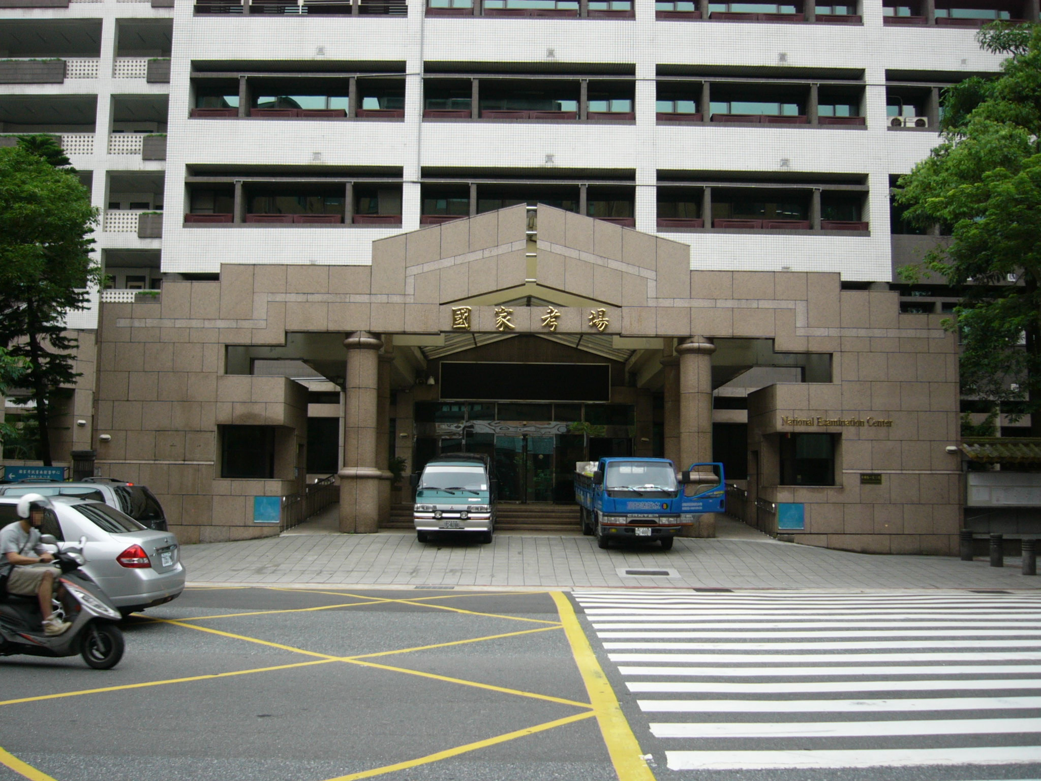 中文（台灣）: 中華民國考選部國家考場，位於臺北市文山區木柵路一段72號，1993年9月完工啟用。